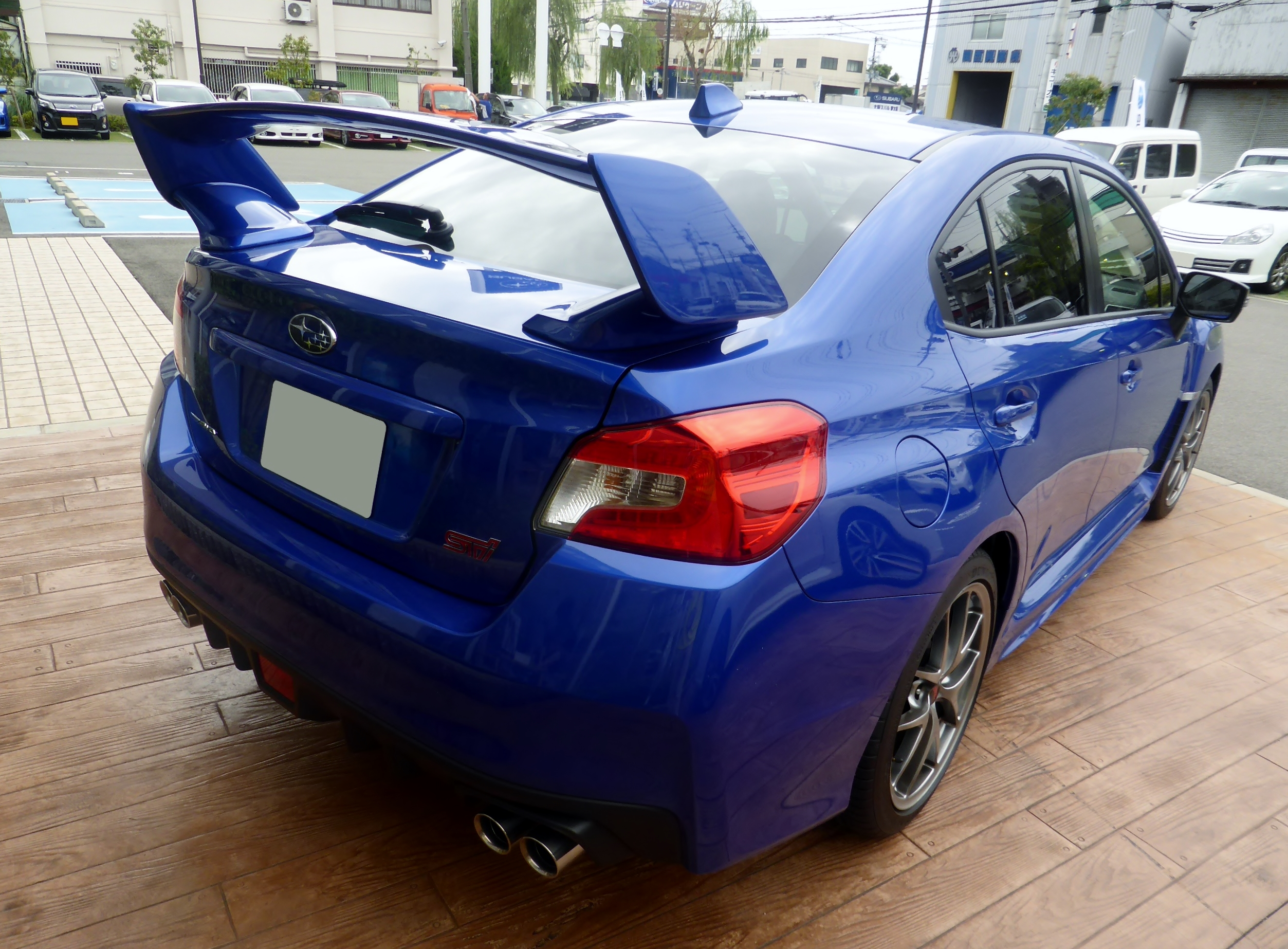 VAB型スバル・WRX STIタイプSをリアから撮影。